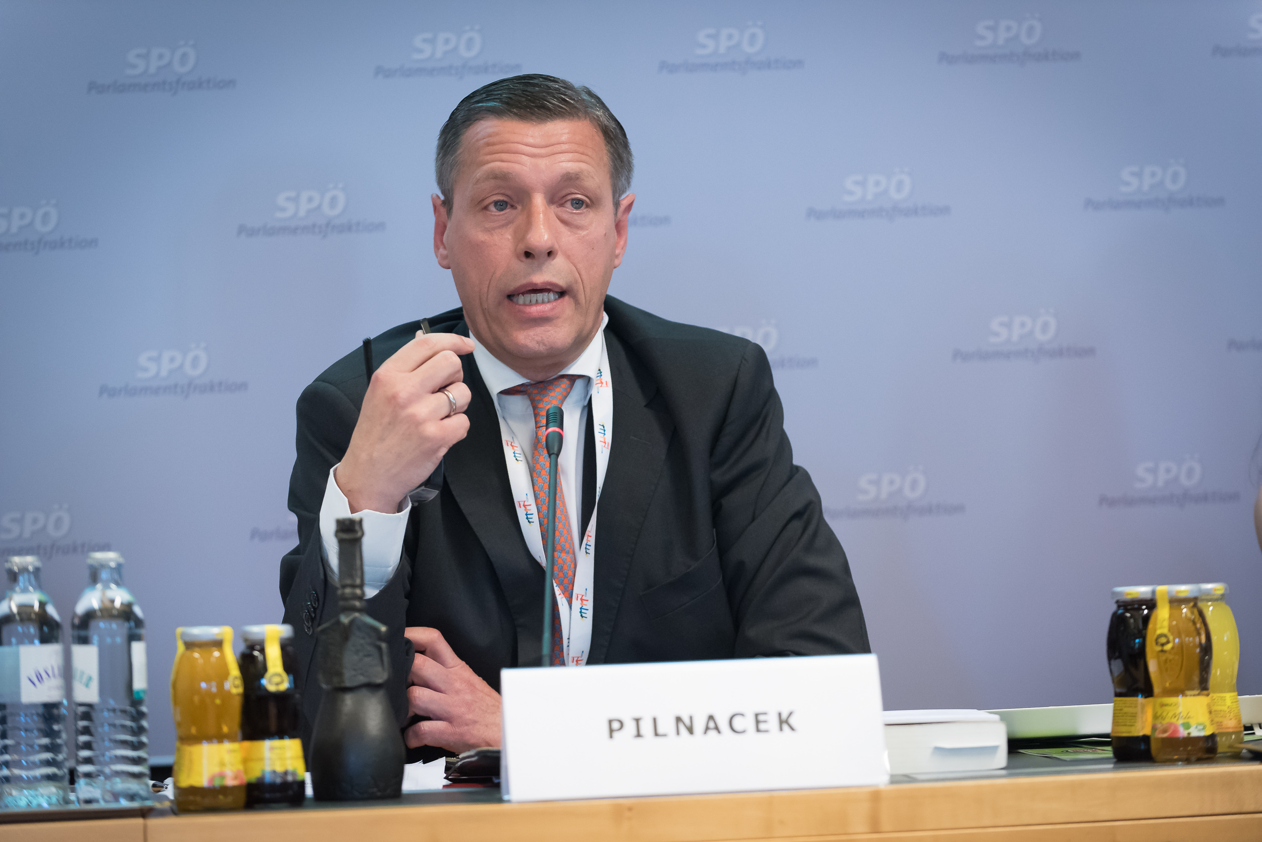 Enquete_NoHateSpeech-348